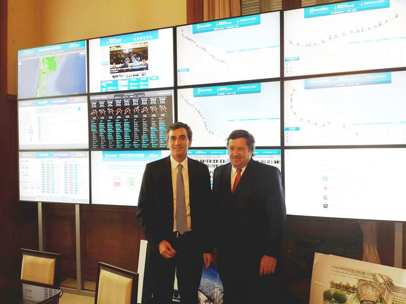 Ministro del Interior de la Nación, Florencio Randazzo y el doctor Jorge Rodríguez Erneta